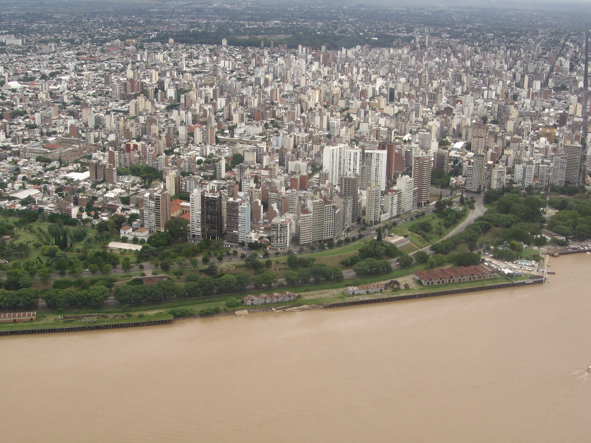 Reunión Rosarigasinos III-Flickr 25/02/2006